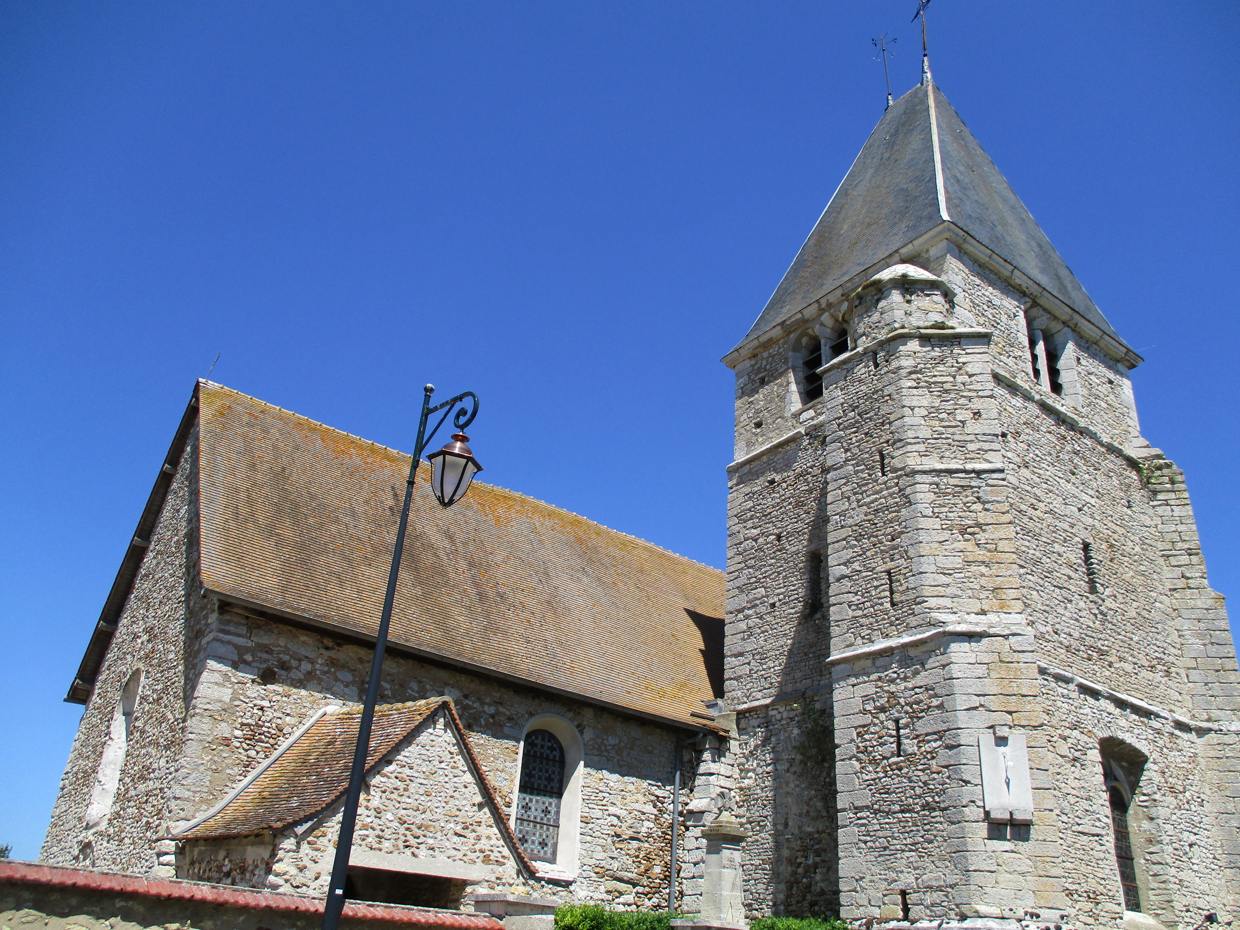 L'église Saint-Léger à Villegats (Eure).